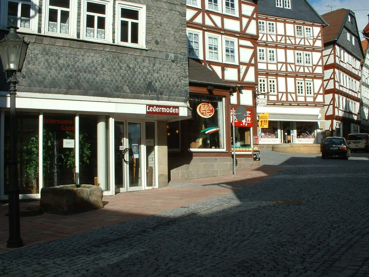 Rekontruierter Brunnen und im Hintergrund rekonstruierte Zisterne, zwei wiederentdeckte Zeugen der mittelalterlichen Wasserversorgung Hombergs